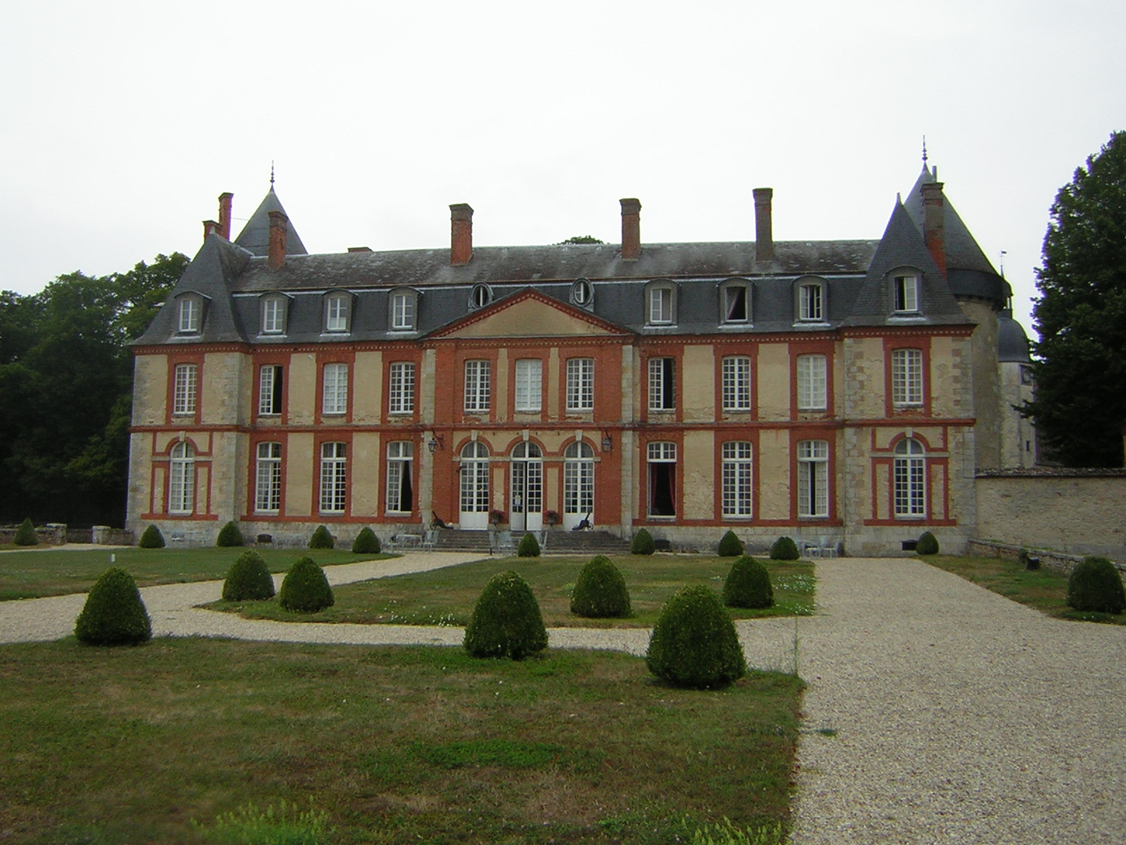 Malesherbes (45) Château